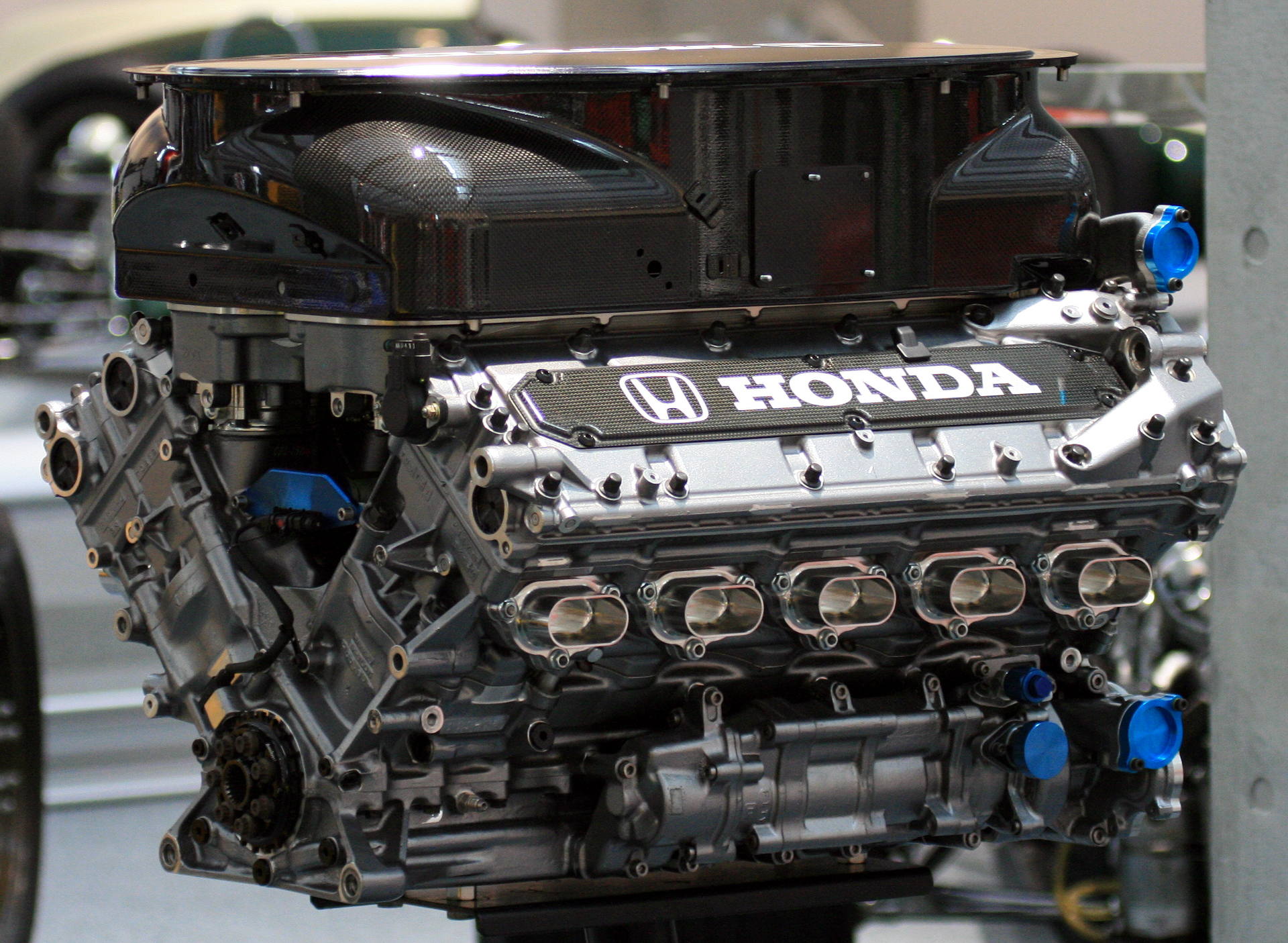 2000 Honda RA000E engine